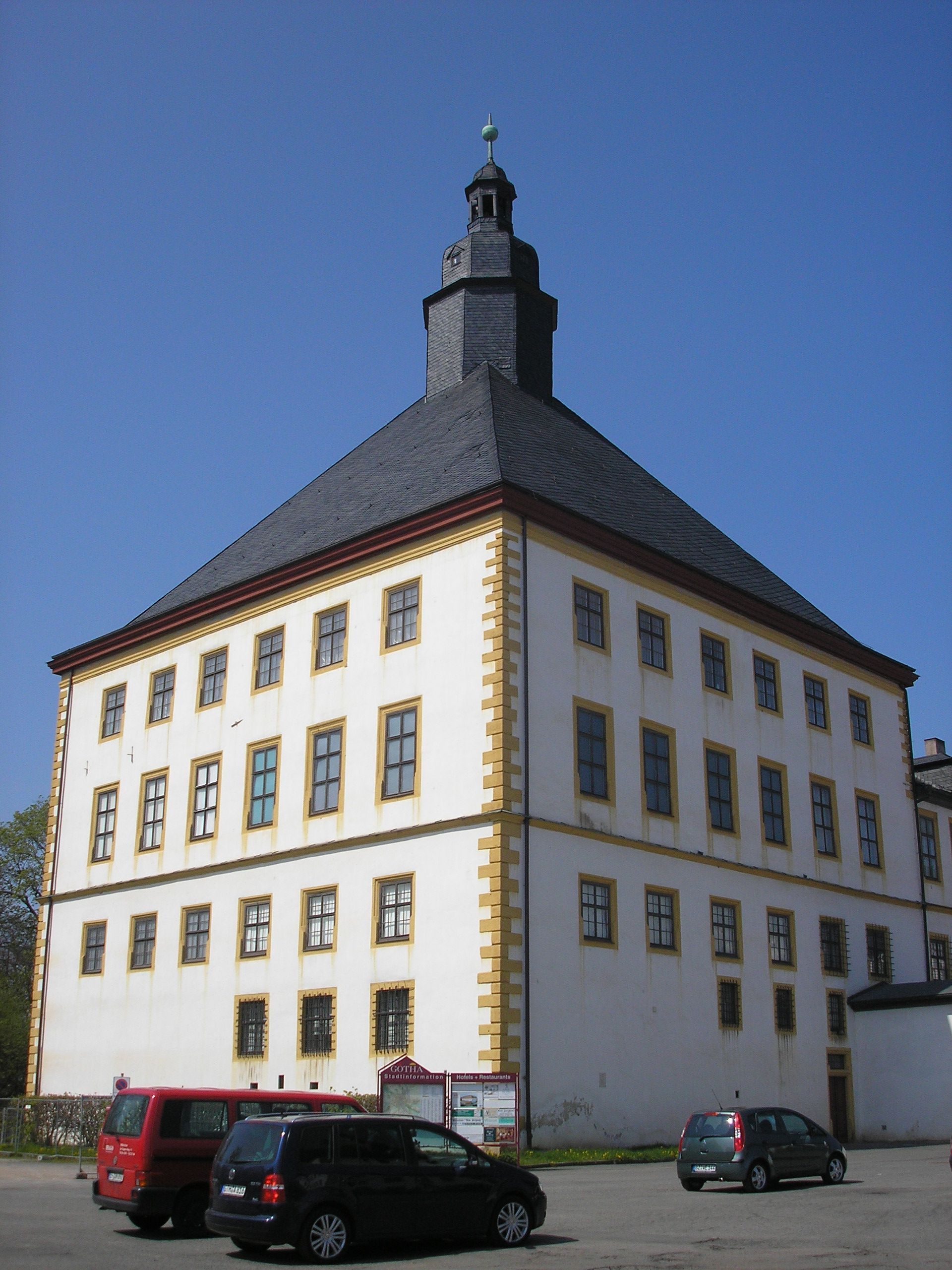 Der Westturm von Schloss Friedenstein in Gotha (Thüringen).